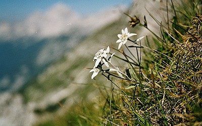 Edelweiß